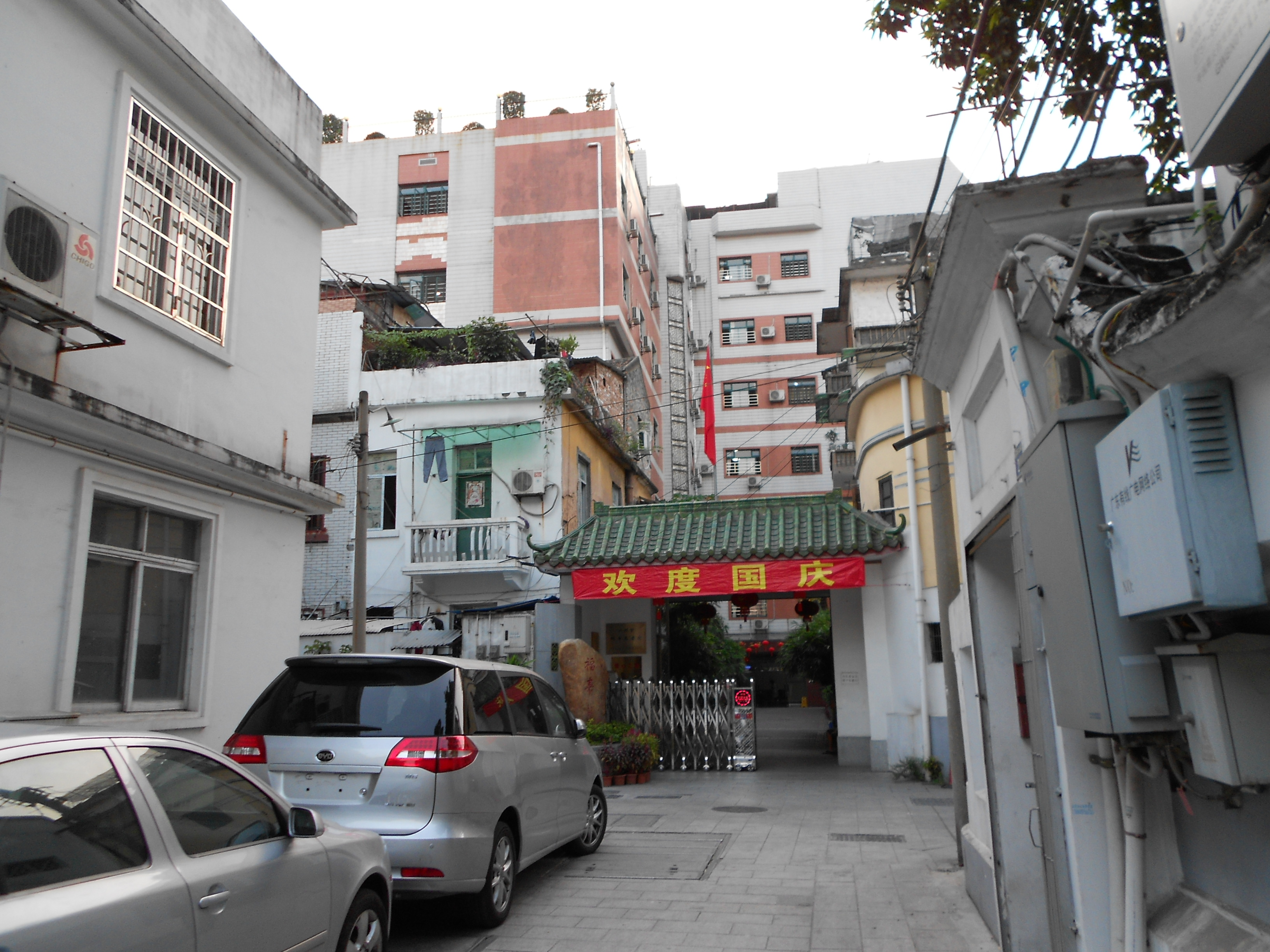 廣州的李眾勝堂，後被當局充公改為「公私合營李眾勝聯合製藥廠」、「廣州中藥三廠」、「廣州眾勝藥廠」。現為「晶輝養老院」。